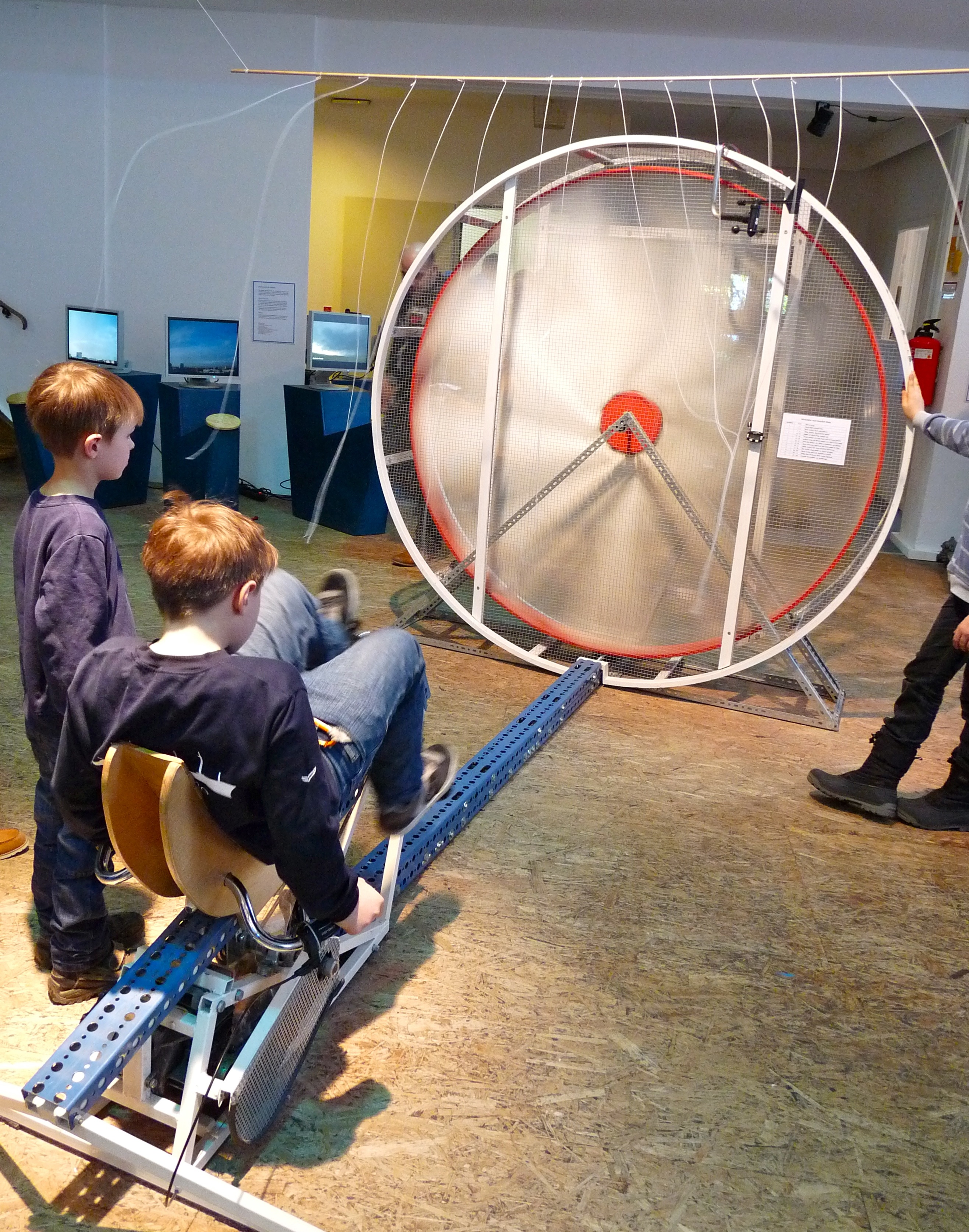 Ausstellungsobjekt Windmaschine in der Ausstellung Luffft des Kinder- und Jugendmuseums München.